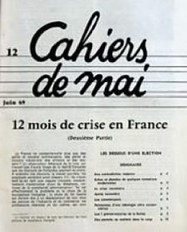 Les Cahiers de Mai sont une revue créée immédiatement après les événements de Mai 1968 et publiée jusqu'en 1974 (n°12, 1er juin 1969).